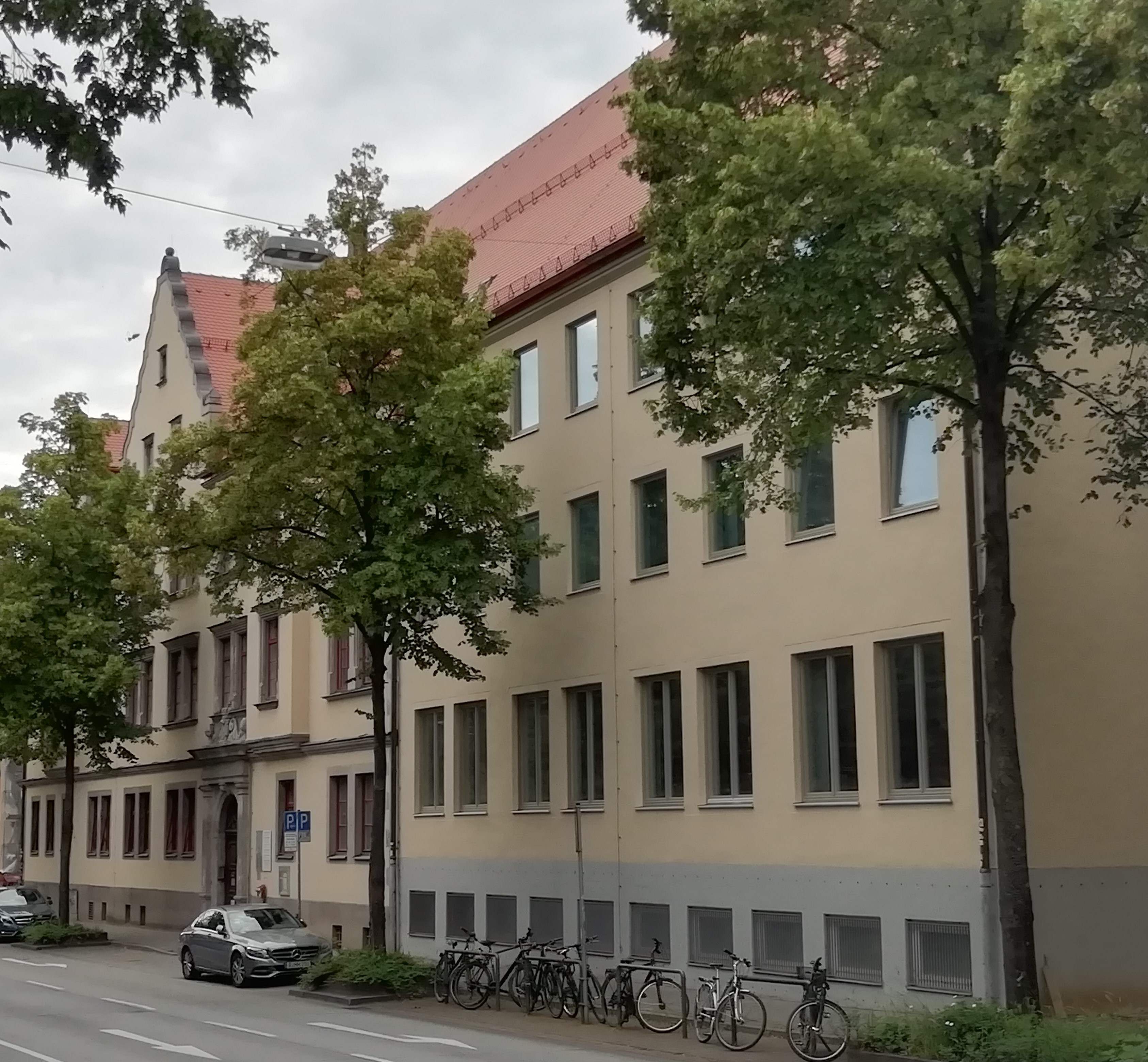 Das Alte Finanzamt wird seit 2007 von der Universität Regensburg genutzt. Darin sind neben universitären Einrichtungen außeruniversitäre Institute wie das Leibniz-Insitut für Ost- und Südosteuropaforschung und das Institut für Ostrecht untergebracht.